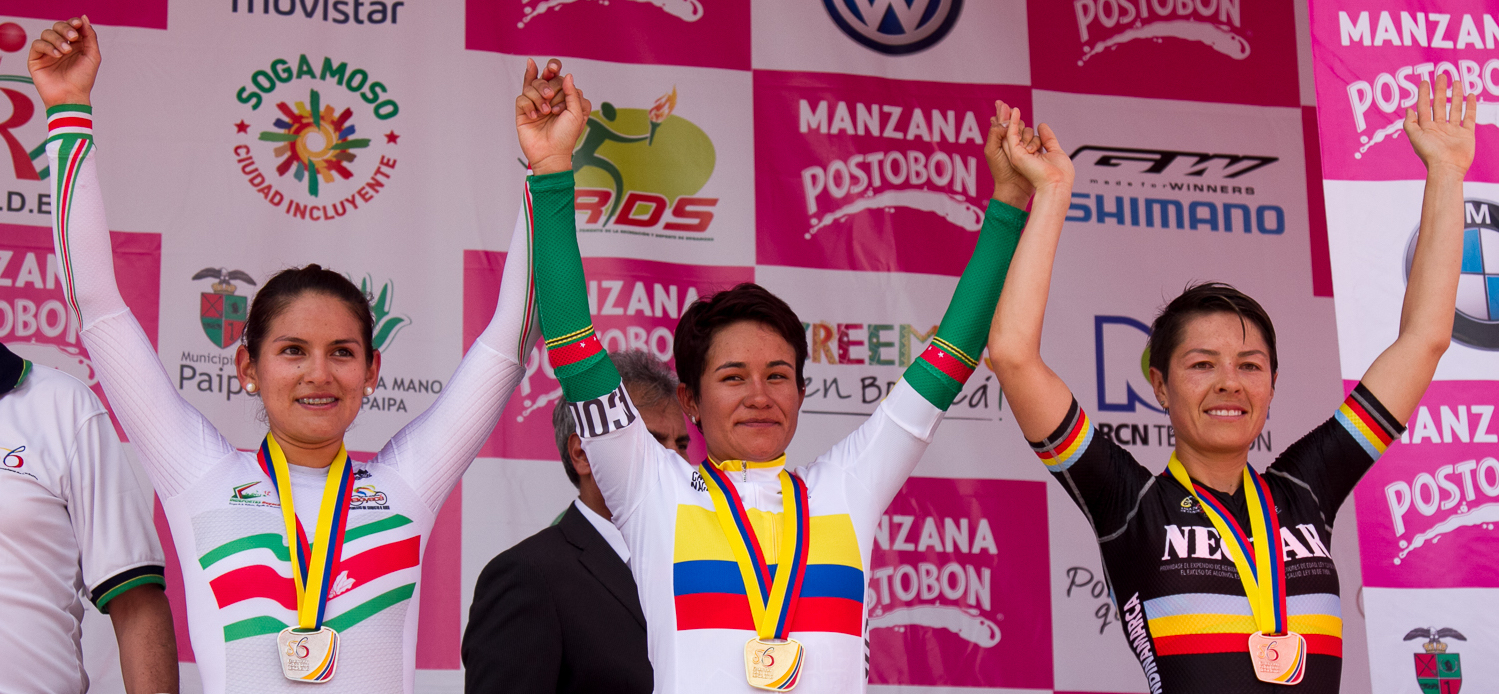 CRI Damas Campeonatos Nacionales de Ruta Boyacá 2016